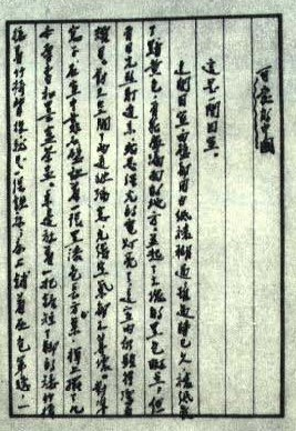 1965-9 1965 方志敏 可爱的中国 手稿